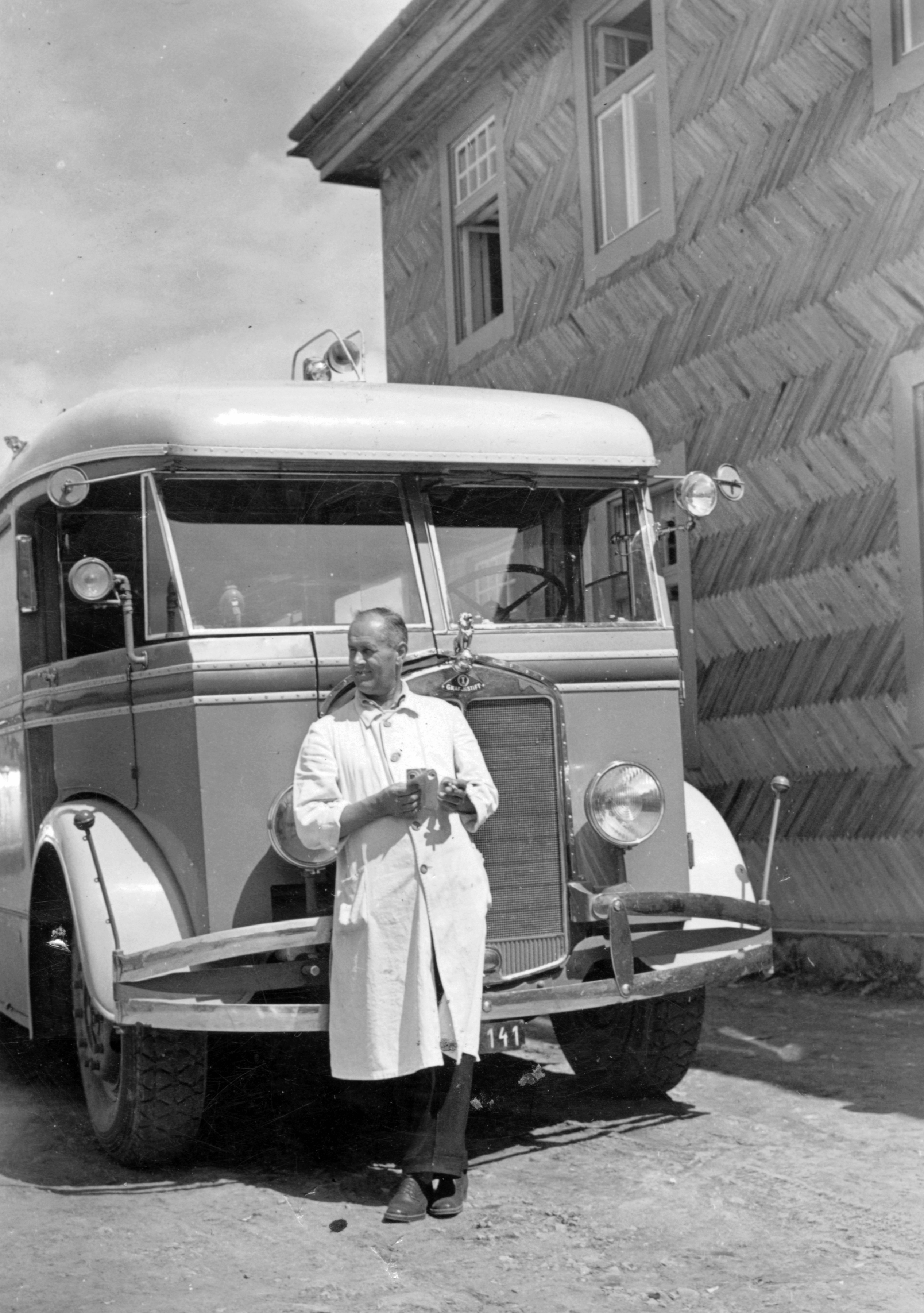 Sportszálló. Autóbusz Gräf & Stift alvázra épített Uhri Imre-féle karosszériával. Location: Ukraine, Uzhok Tags: Transcarpathia, bus, Gräf&Stift-brand;, Austrian brand Title: Sportszálló. Autóbusz Gräf & Stift alvázra épített Uhri Imre-féle karosszériával.